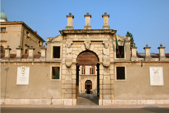 Sede attuale dell'accademia di belle arti di verona